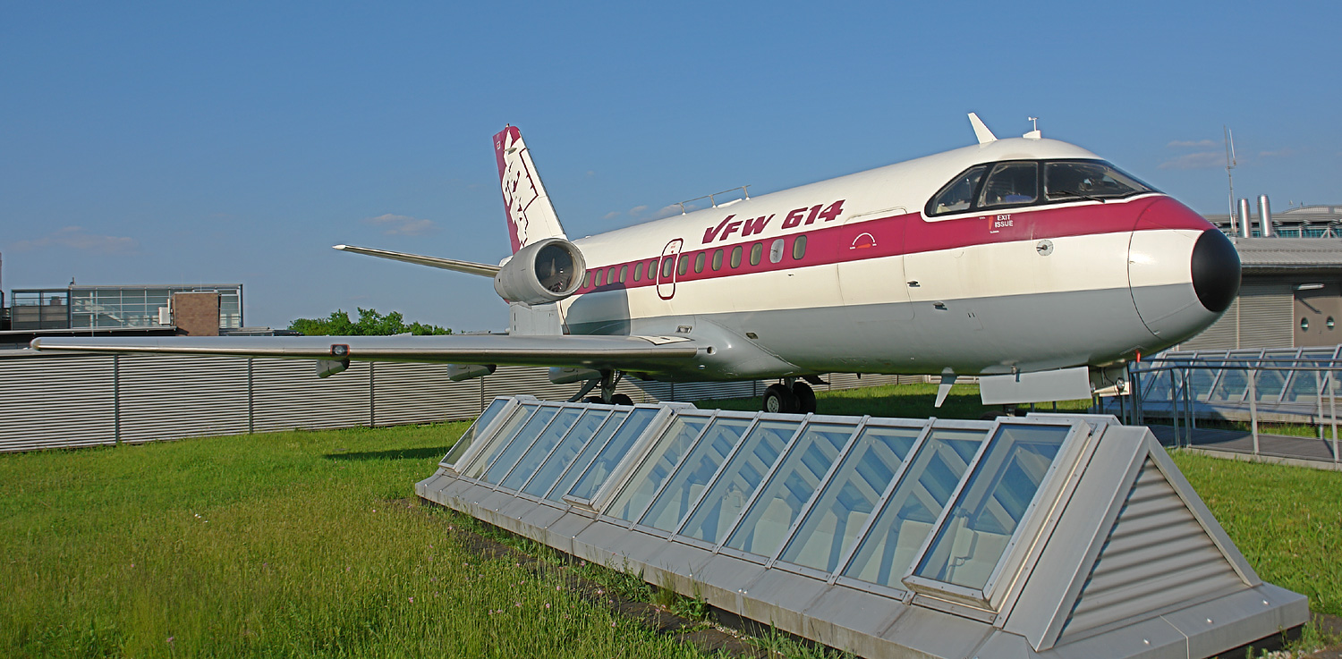 Flughafen Bremen in der Airport City: VFW 614 auf der Besucherterasse